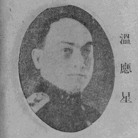 中文（台灣）: 《民國名人圖鑑》肖像